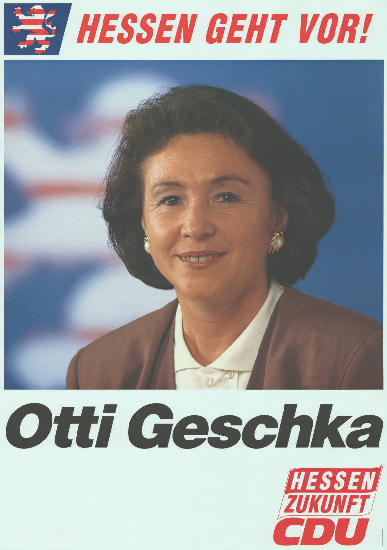 Hessen geht vor! Otti Geschka Hessen Zukunft CDUAbbildung:Hessischer Löwe - PorträtfotoPlakatart:Kandidaten-/Personenplakat mit PorträtAuftraggeber:CDU Hessen, WiesbadenObjekt-Signatur:10-007 : 808Bestand:Landtagswahlplakate Hessen (10-007)GliederungBestand10-18:Landtagswahlplakate Hessen (10-007) » CDULizenz:KAS/ACDP 10-007 : 808 CC-BY-SA 3.0 DE